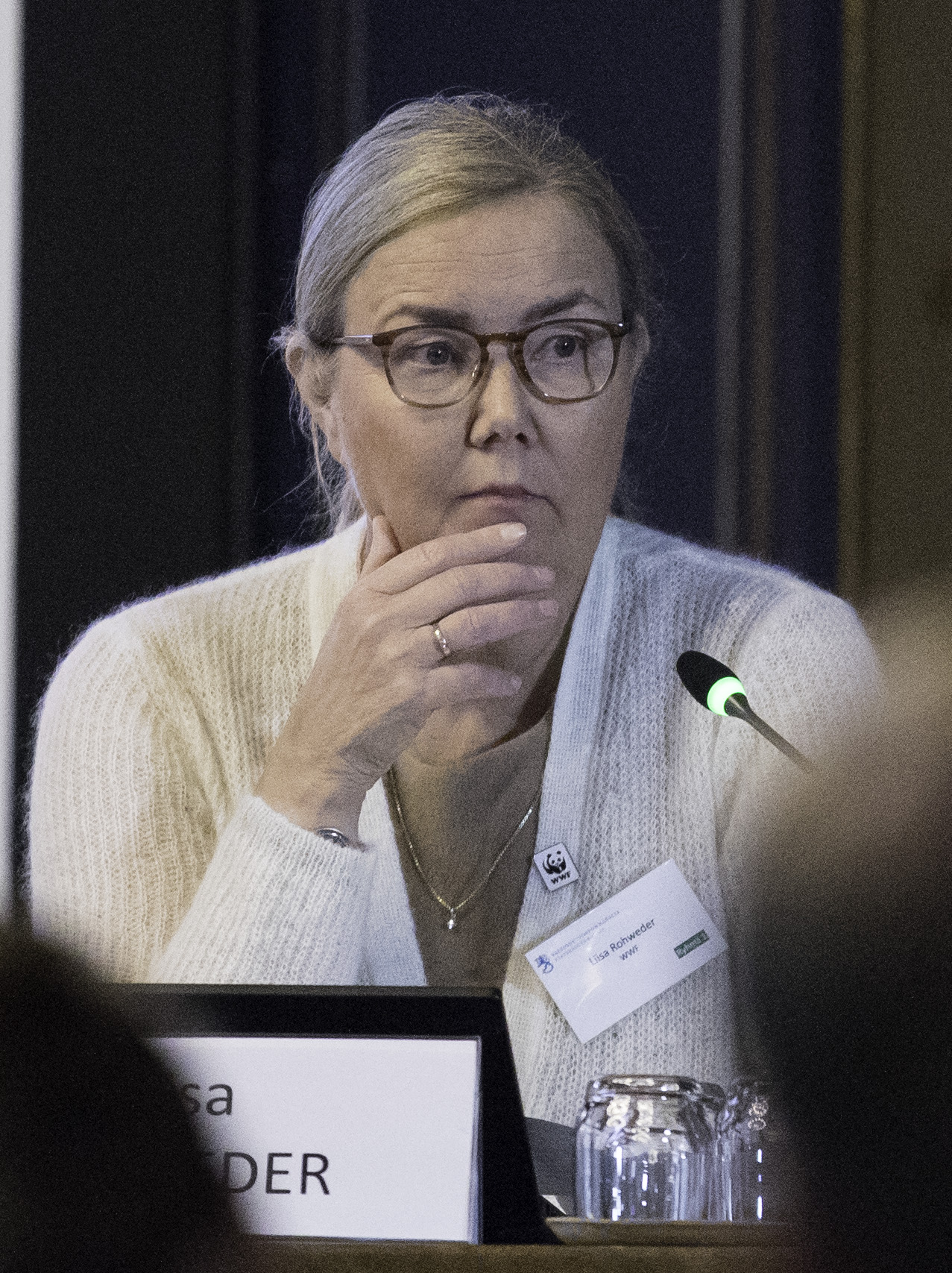 © Lauri Heikkinen | valtioneuvoston kanslia